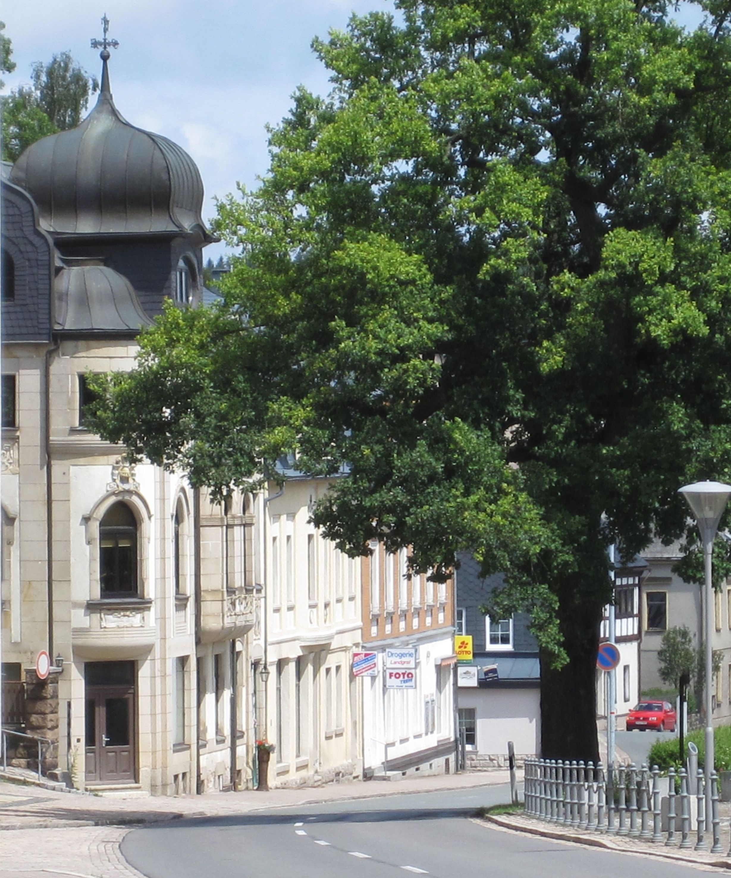 Die Hauptstraße verläuft im Tal, das durch den Dorfbach – heute fast im ganzen Dorf verrohrt – gebildet wird. In Blickrichtung fällt die Straße deutlich zum Filzbach am Platz „Bayerischer Hof“/“Paradies“ und weiter zur Zwickauer Mulde im Ortsteil Schönheiderhammer hin ab. Deutlich ist die stadtähnliche Bebauung zu sehen.